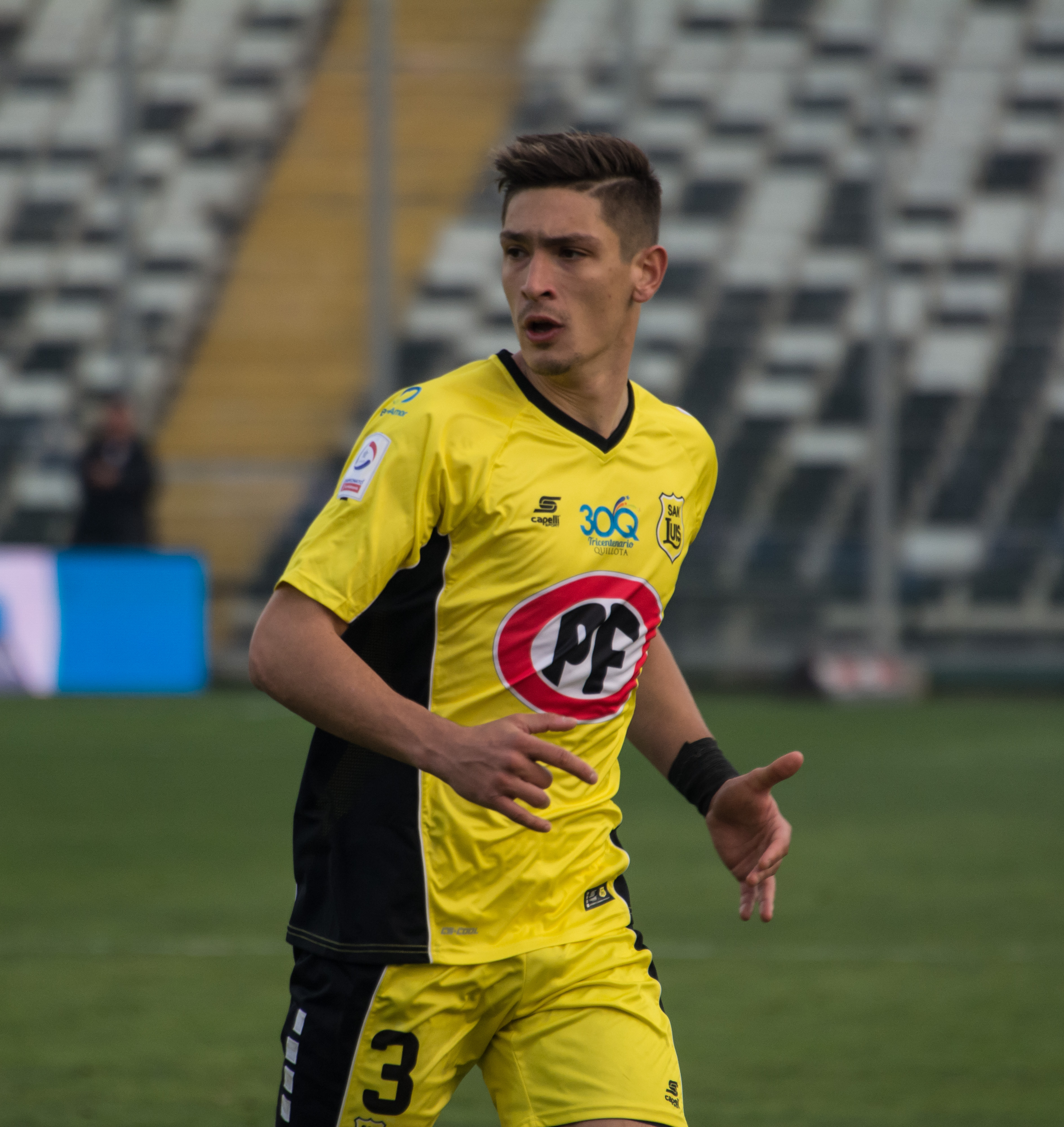 Joaquín Pereyra, Colo-Colo v San Luis, Estadio Monumental, Macul, Santiago, Chile.